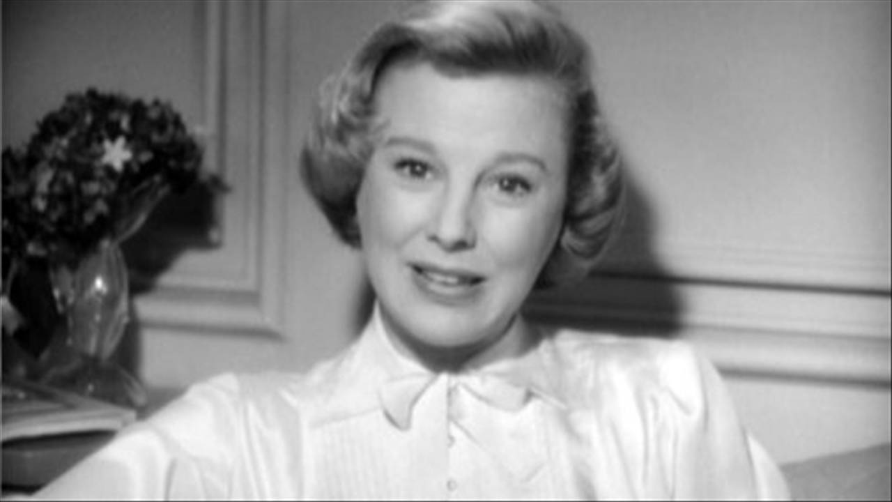 1949年製作の映画『甦る熱球』の予告編動画より。